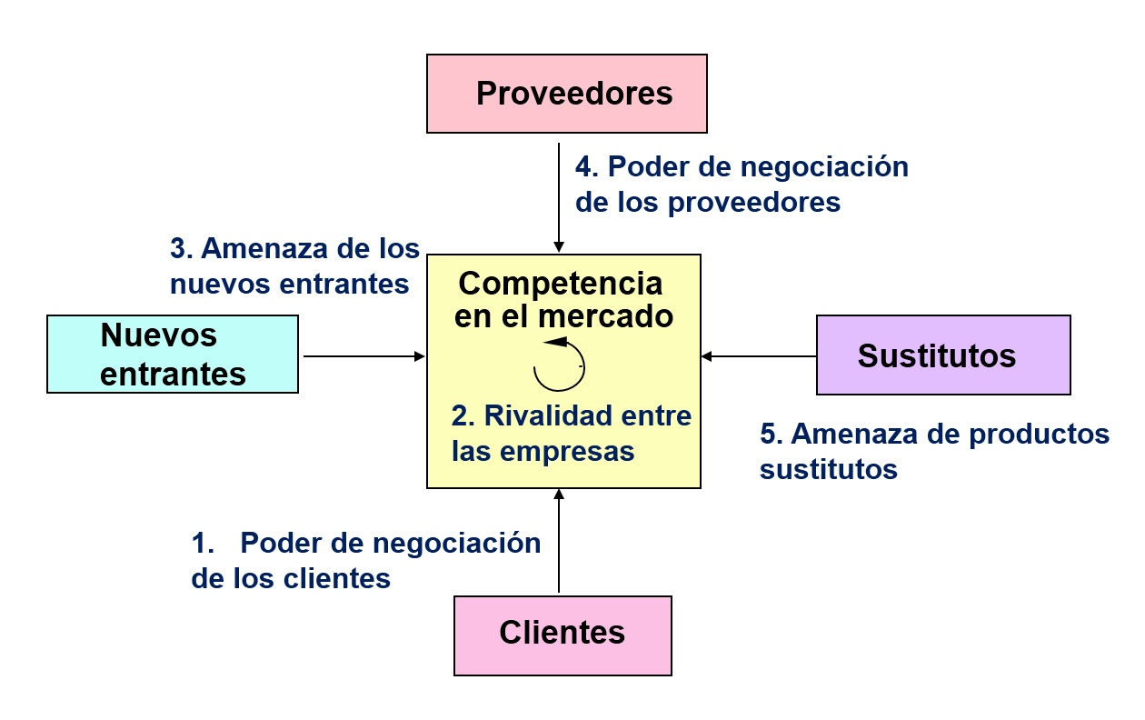 Modelo Teórico de la Cinco Fuerzas de Michael Porter